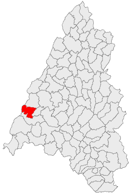 Categorie:Hărţi ale judeţului Bihor